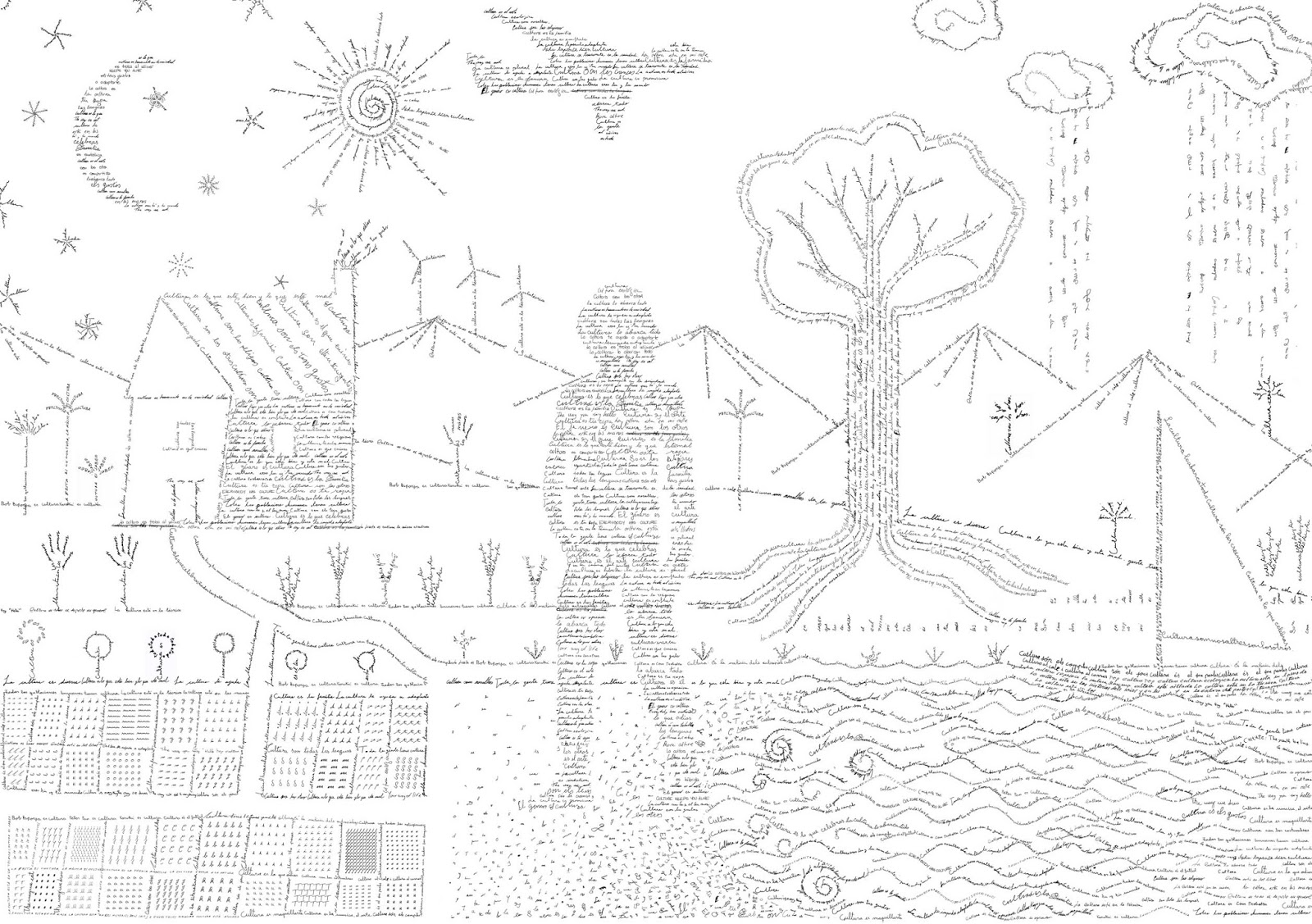 Natura Cultura, cal·ligrama utilitzat a l'exposició permanent del Museu Valencià d'Etnologia. Imatges realitzades per Andrés Marín Jarque on, imitant la cal·ligrafia de gent major, es recullen definicions donades per visitants del museu sobre què és la cultura.